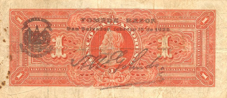 1 колон обр. 1920. Реверс. Сальвадор. Изображён Христофор Колумб. Надпечатка 1925 года